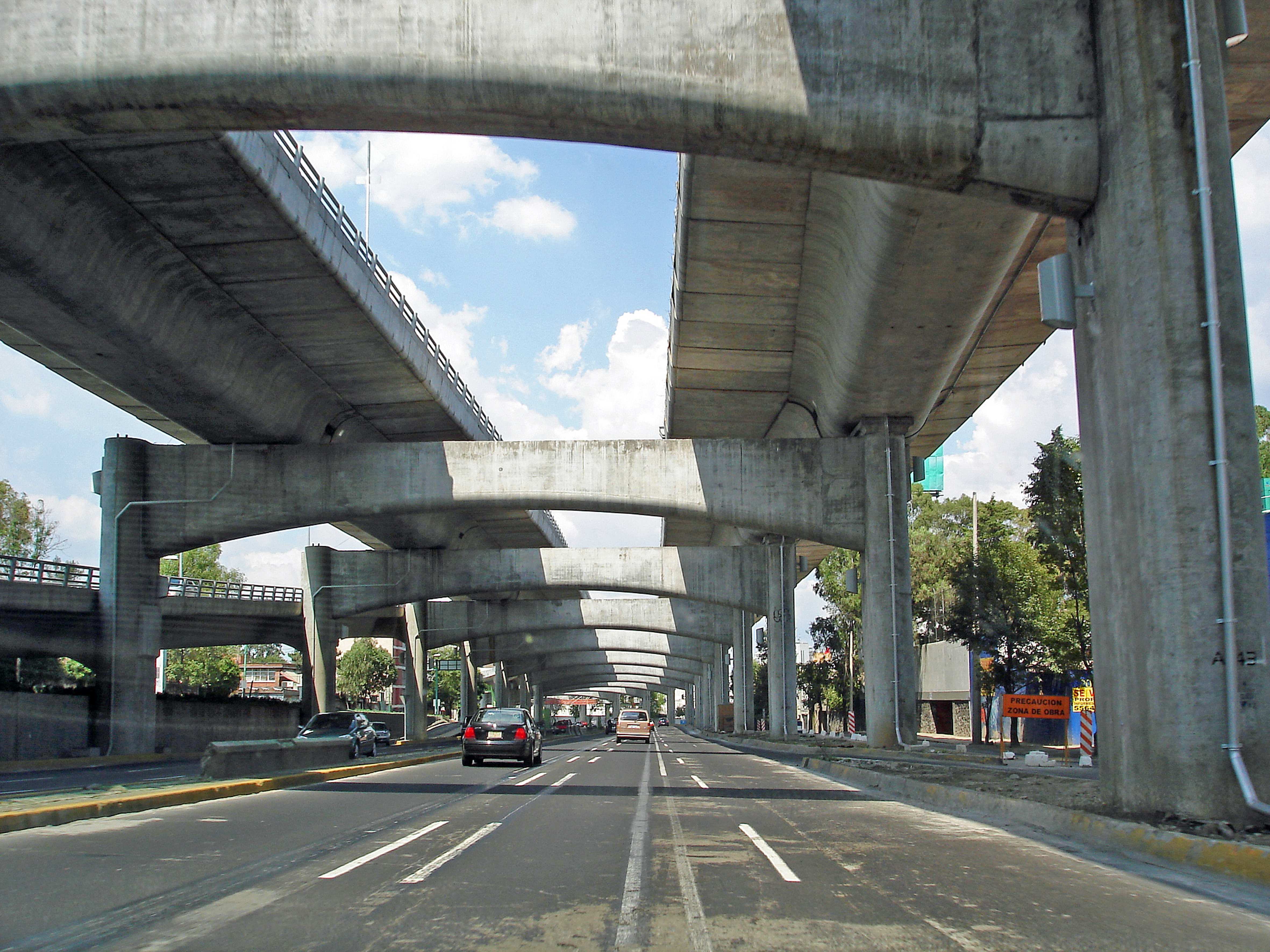 Anillo Periferico, Mexico City